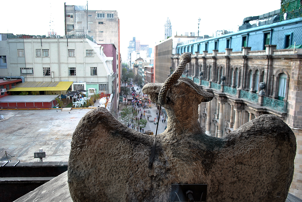 Vista de la calle 16 de septiembre desde el tercer piso del Antiguo Palacio del Ayuntamiento.